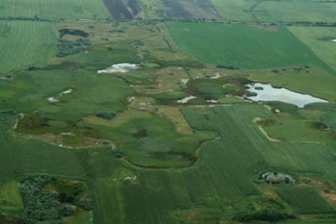 Sárvíz-völgye Tájvédelmi Körzet, Sárszentágota, Hungary, aerialphotography